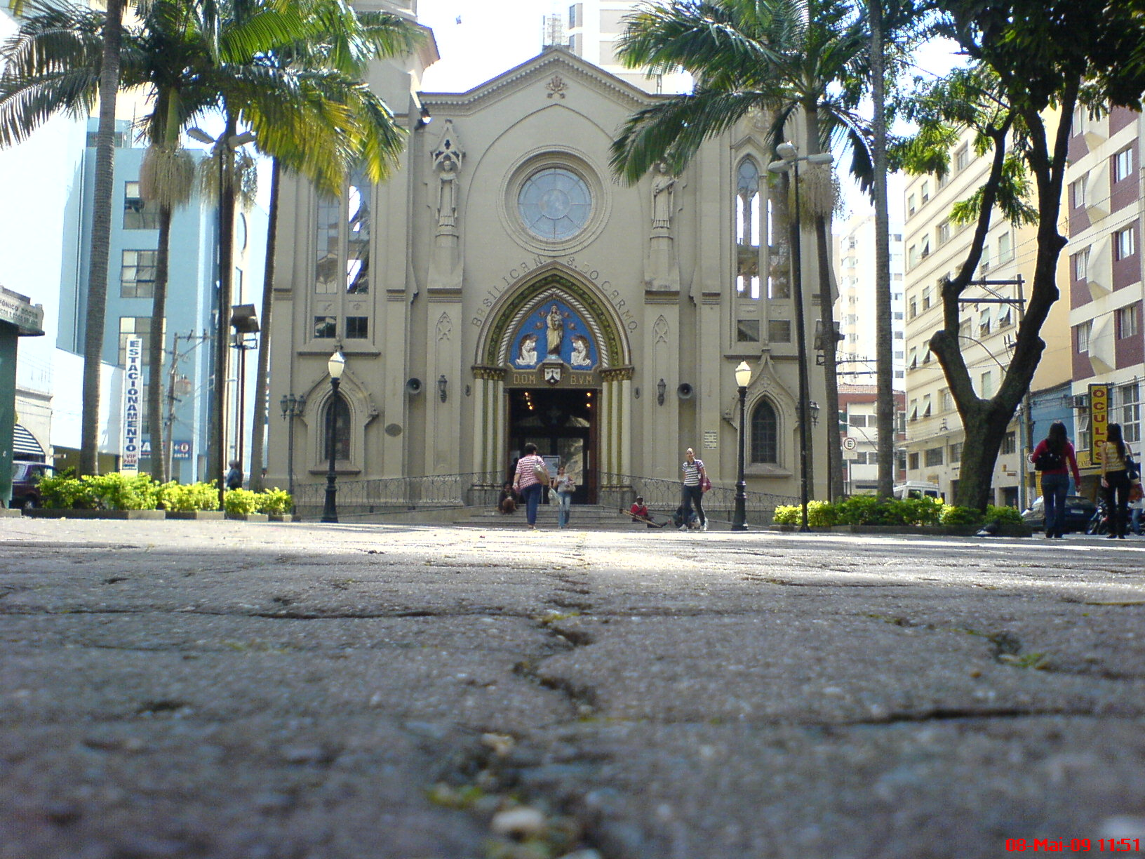 Basílica de Nossa Senhora do Carmo, Campinas-SP